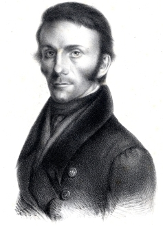 Friedrich Parrot (* 14. Oktober 1792; † 15. Januar 1840), deutscher Naturforscher und Forschungsreisende